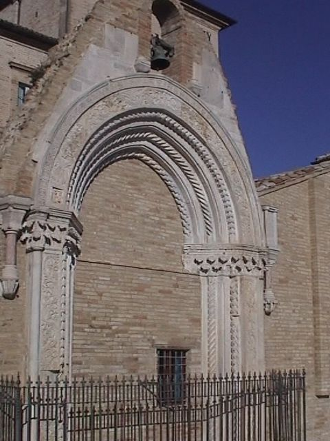 Montegiorgio (FM): Resti del portale ex chiesa di San Salvatore,lavoro personale, 22/11/2006, Pietro Liberati